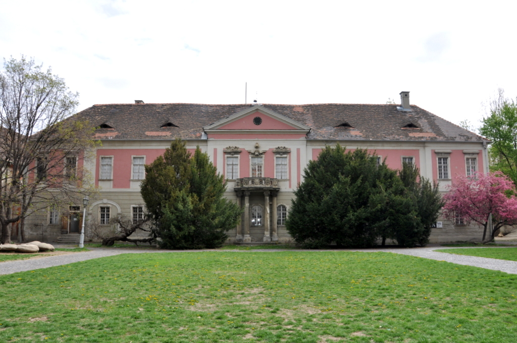 Zichy Palace, Óbuda, Budapest, Hungary